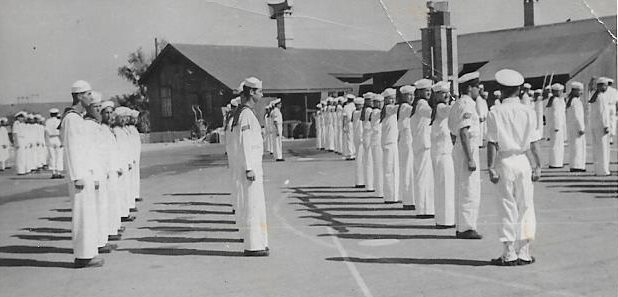 חיל הים במדים לבנים השתלמות מקצועית לצוותי הקורבטות בבסיס ההדרכה